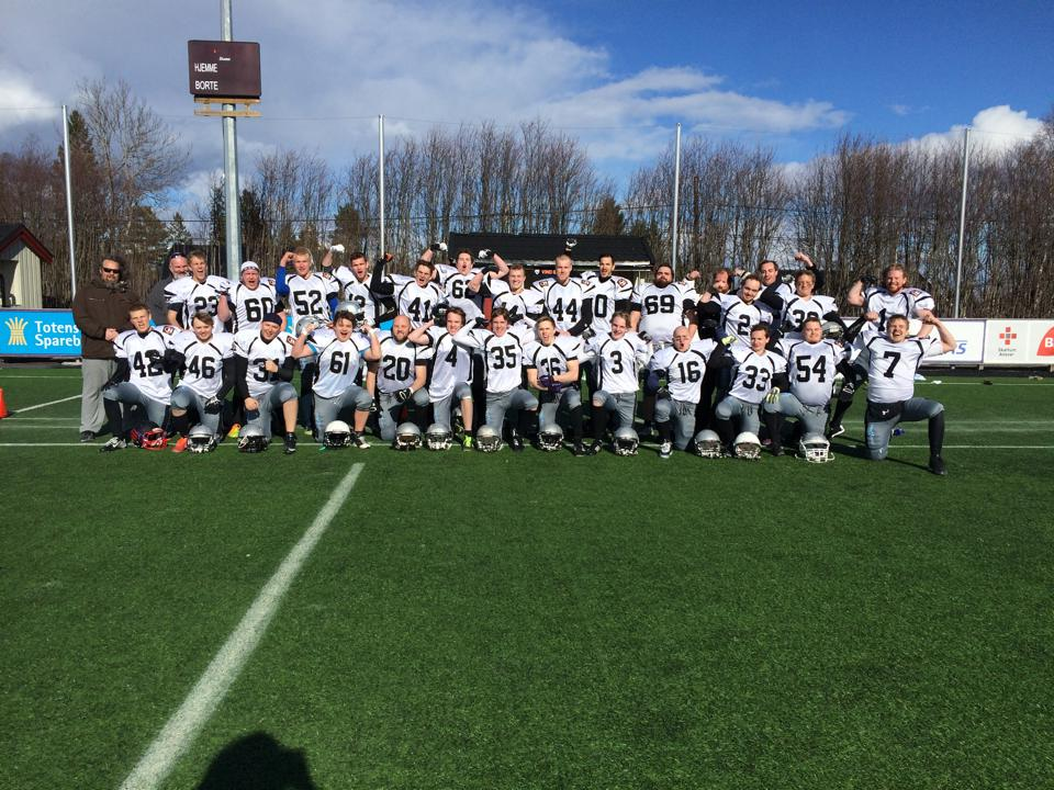 Tønsberg Raiders etter bortekamp mot Gjøvik Swans